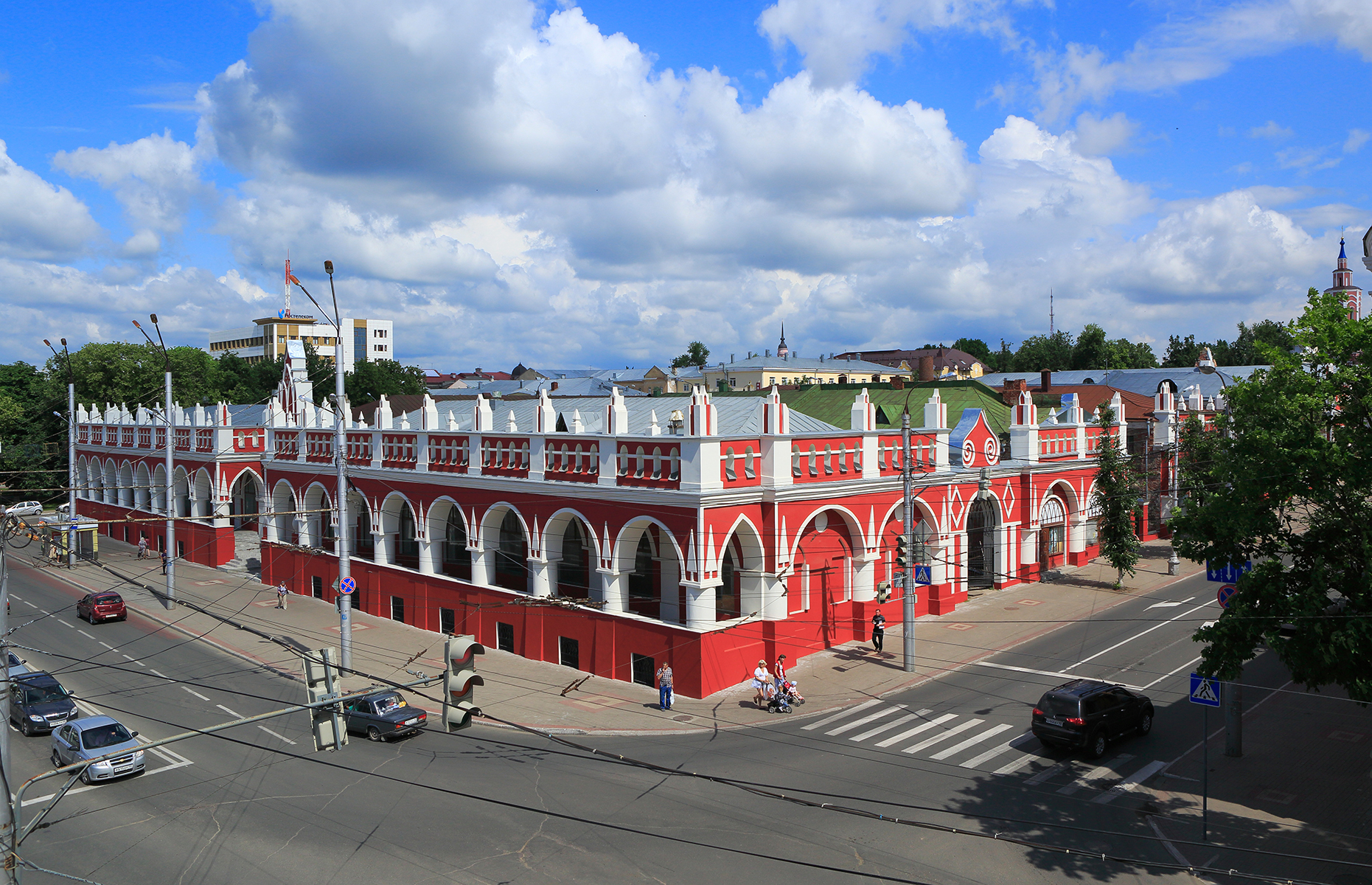 Пересечение улиц Ленина и Баженова